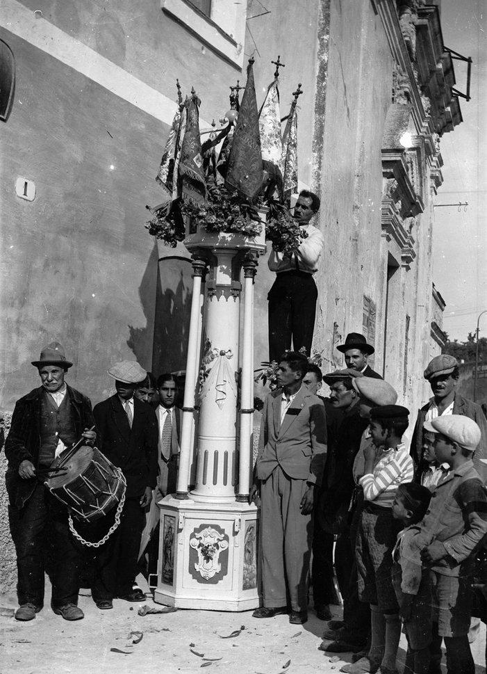 Un candeliere in una fotografia dei primi del '900.